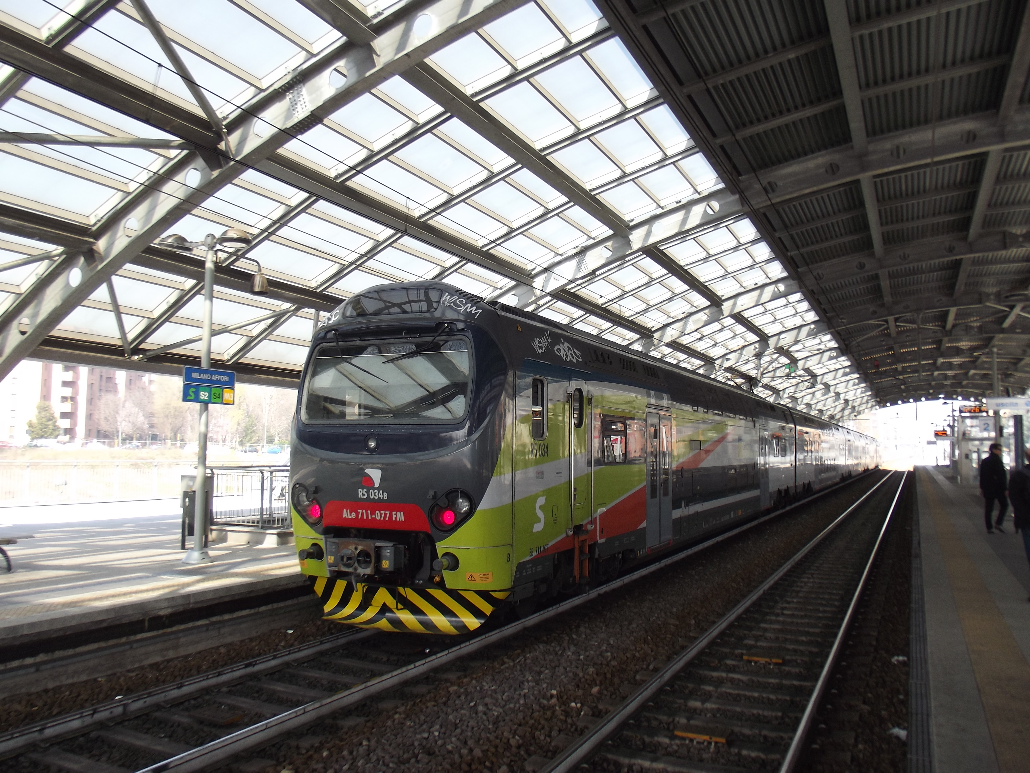 Trenord dubbeldekstrein in Milano Nord Affori.